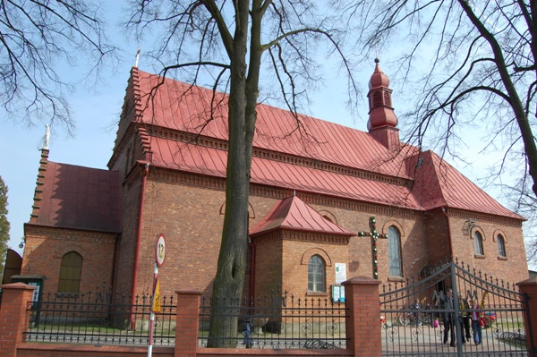 Kościół Parafialny pw. Najświętszej Marii Panny Nieustającej Pomocy w Buczu.